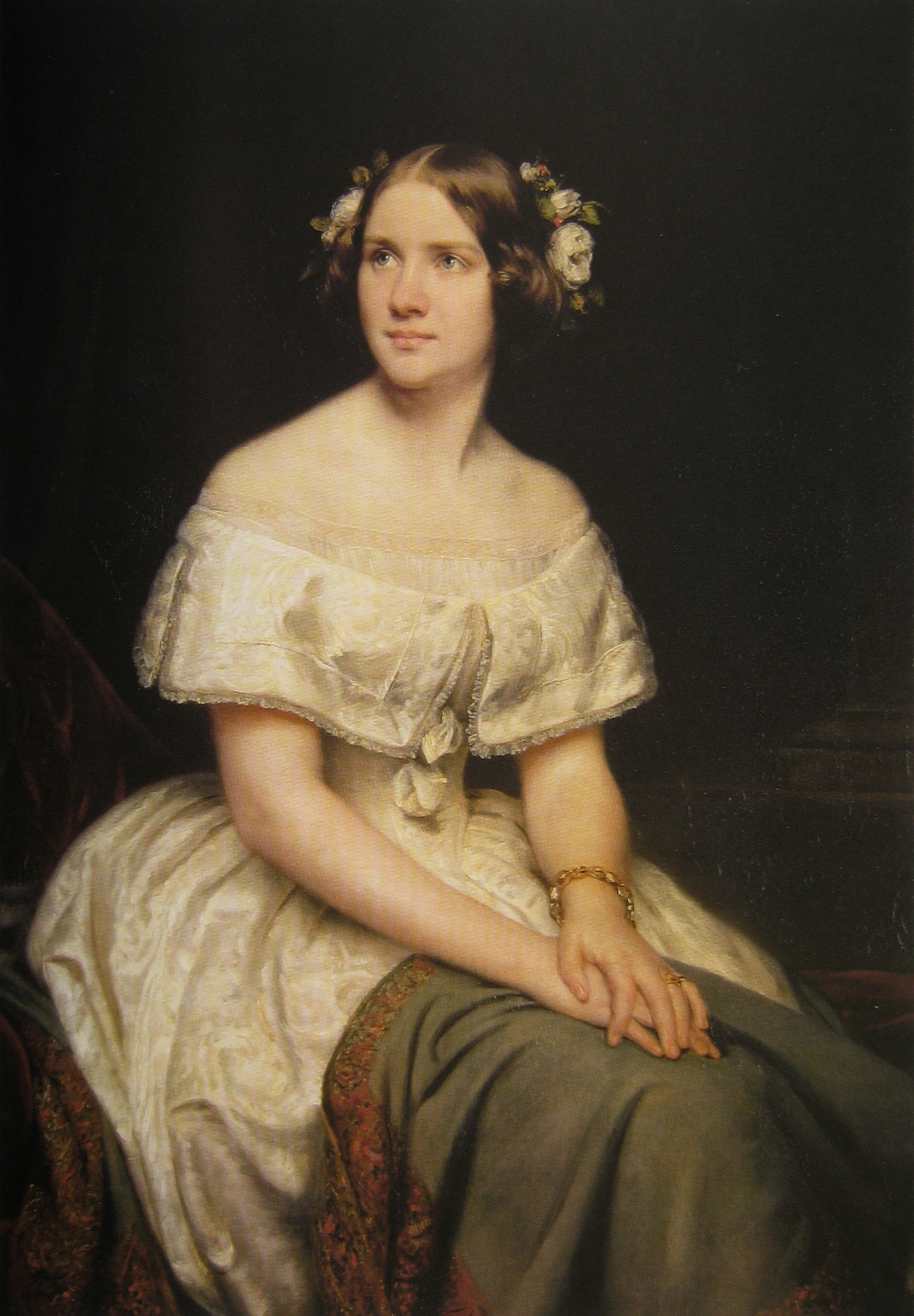 Sopransångerskan Jenny Lind (1820–1887), kallad ”den svenska näktergalen”.